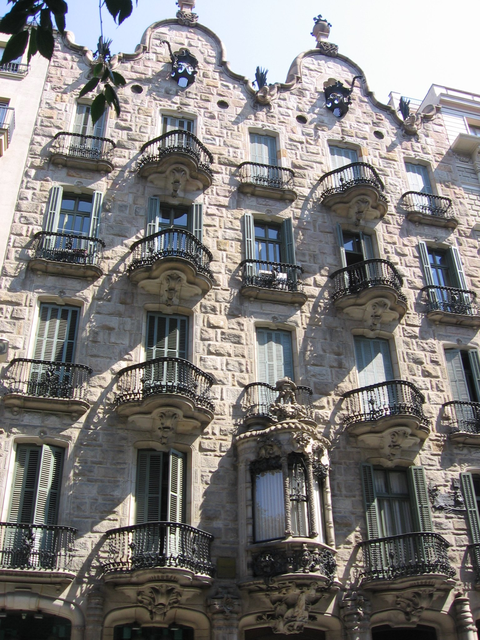 Casa Calvet a Barcelona, obra d'Antoni Gaudí